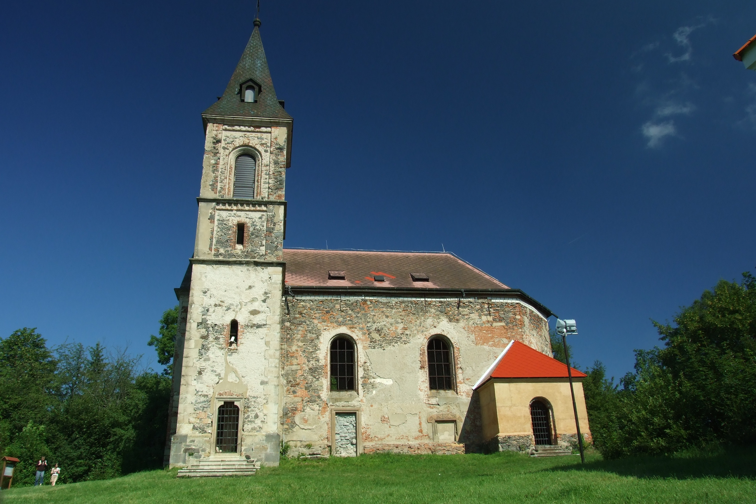 Hrad Krasíkov (Švamberk) s kostelem sv. Maří Magdaleny, zřícenina (Kokašice), 3,5 km západně od Konstantinových Lázní, Kokašice